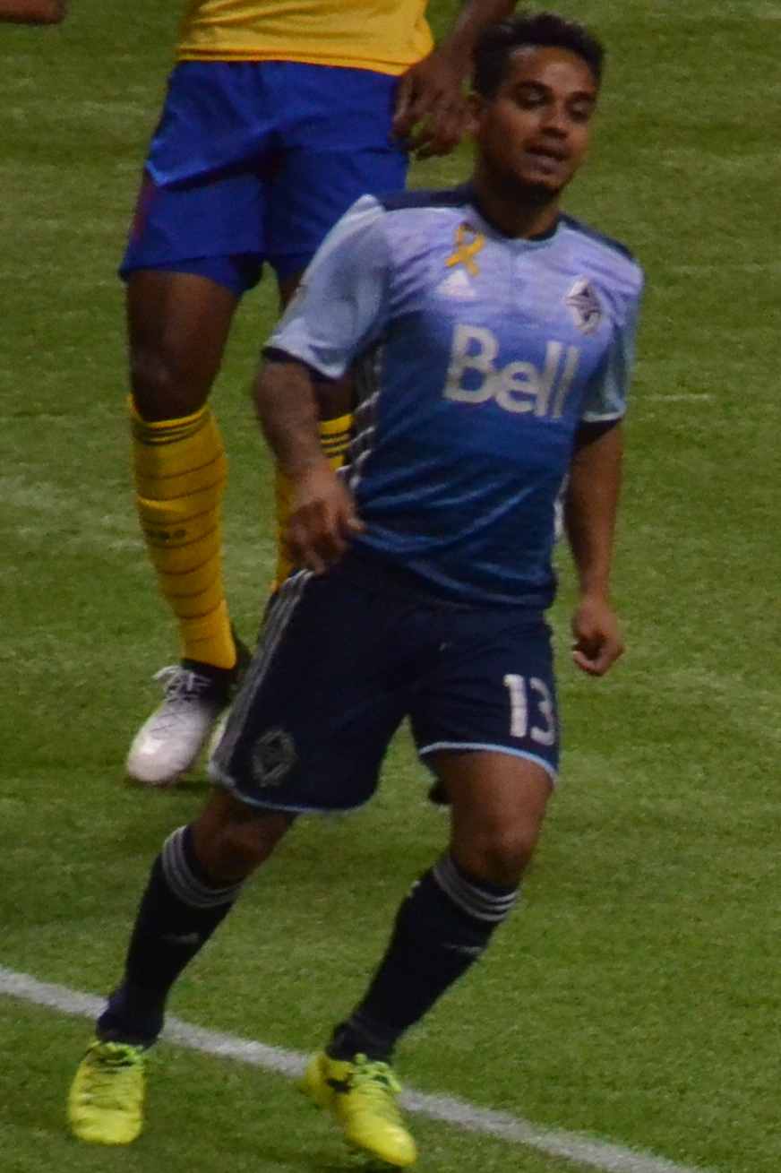 Vancouver v Colorado (14)